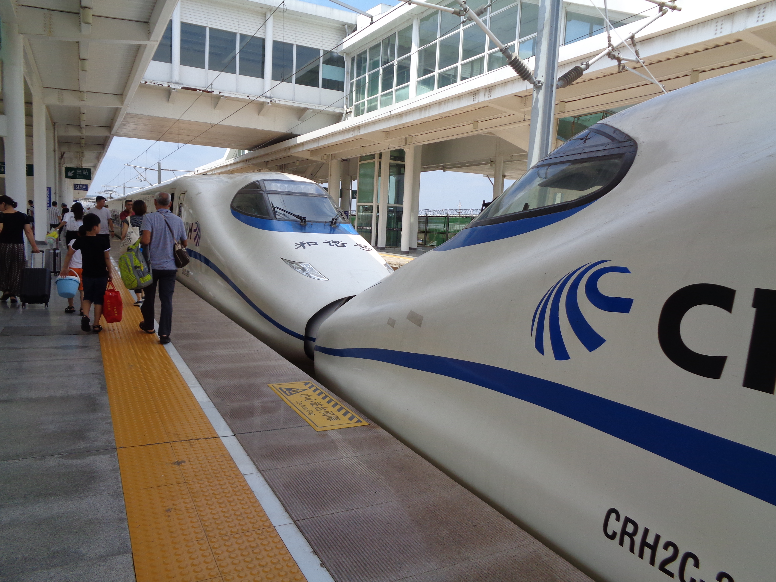 G1918在商丘站